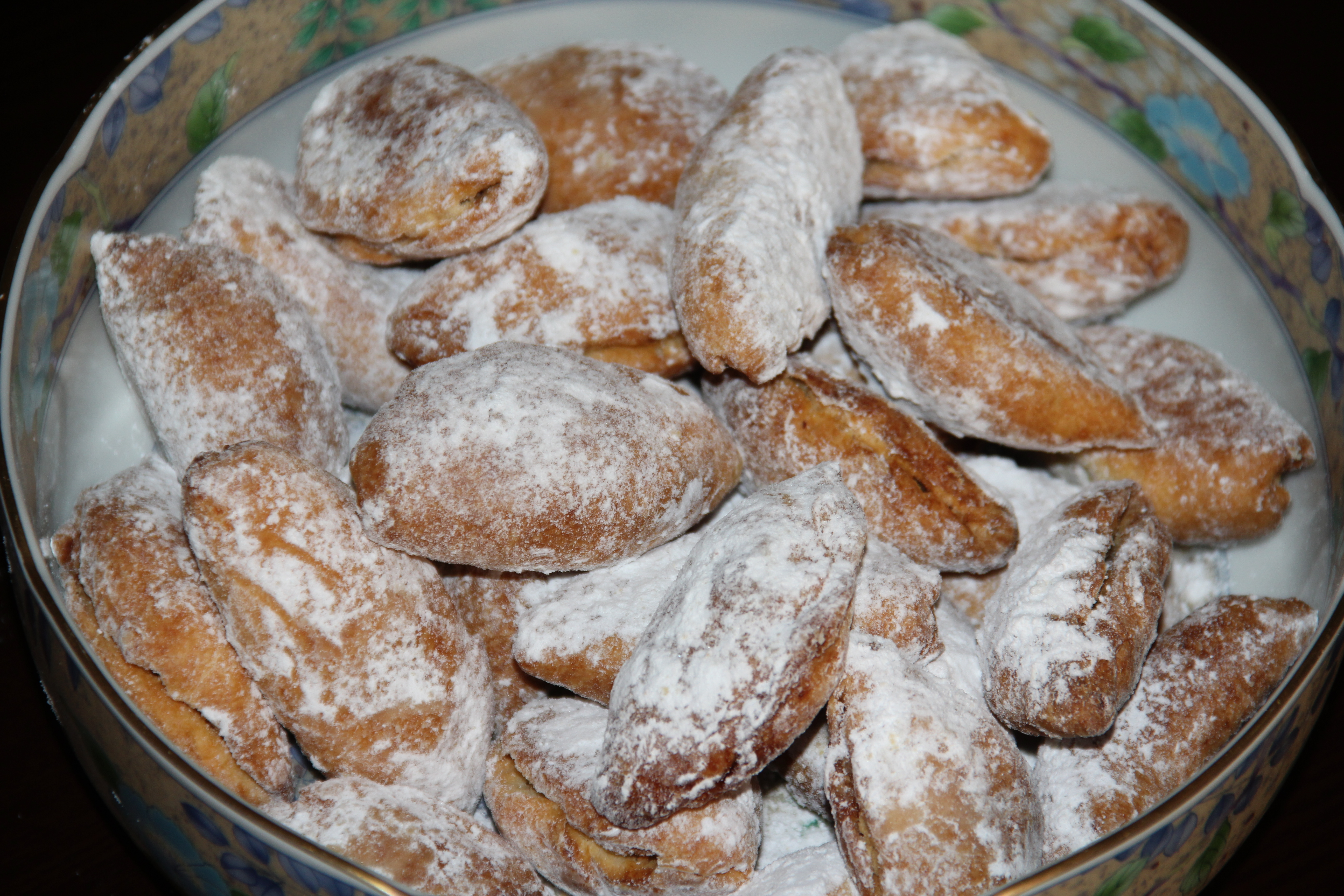 قطاب شیرینی ایرانی